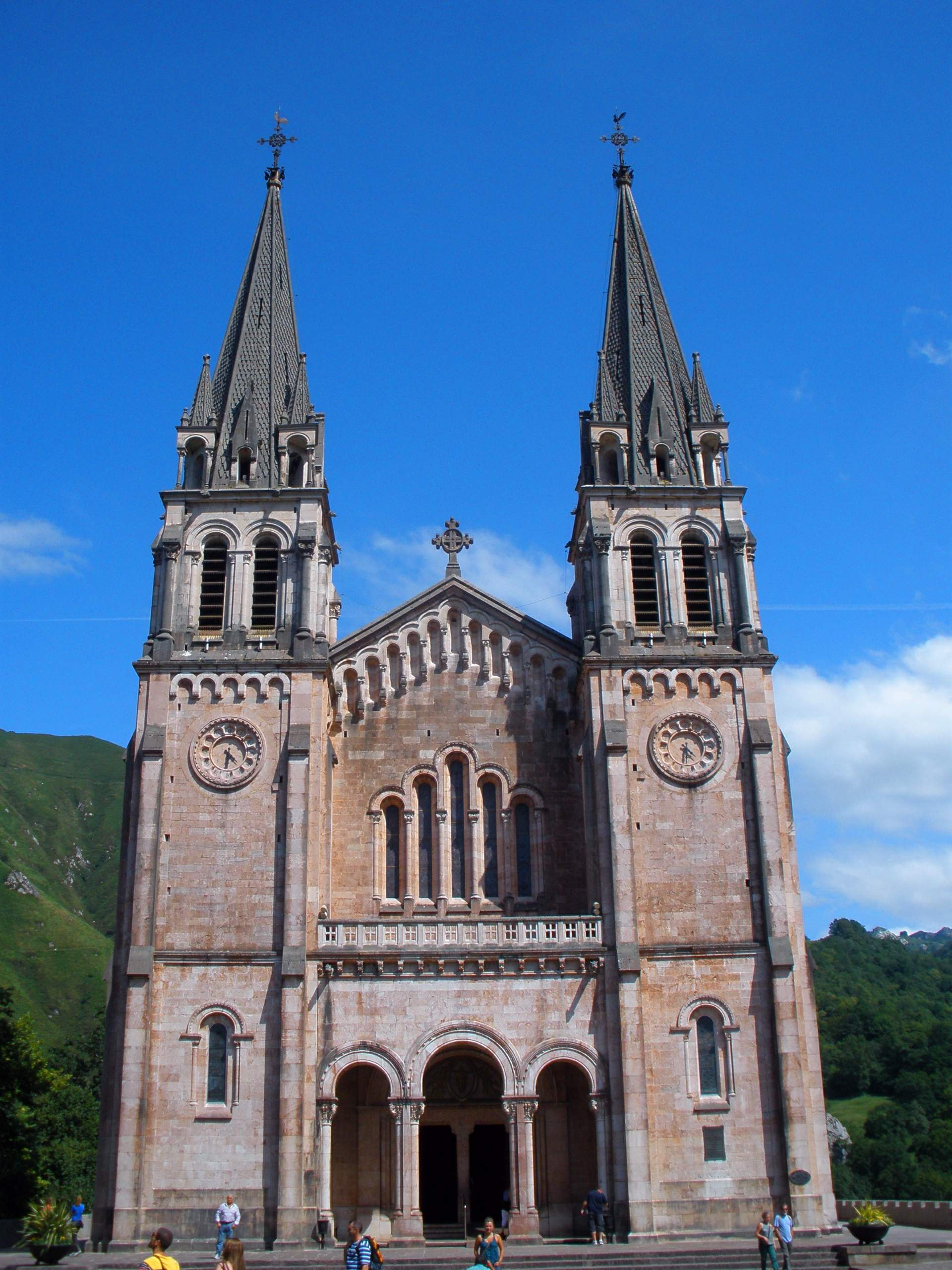 Basílica de Santa María la Real de Covadonga (Asturias)